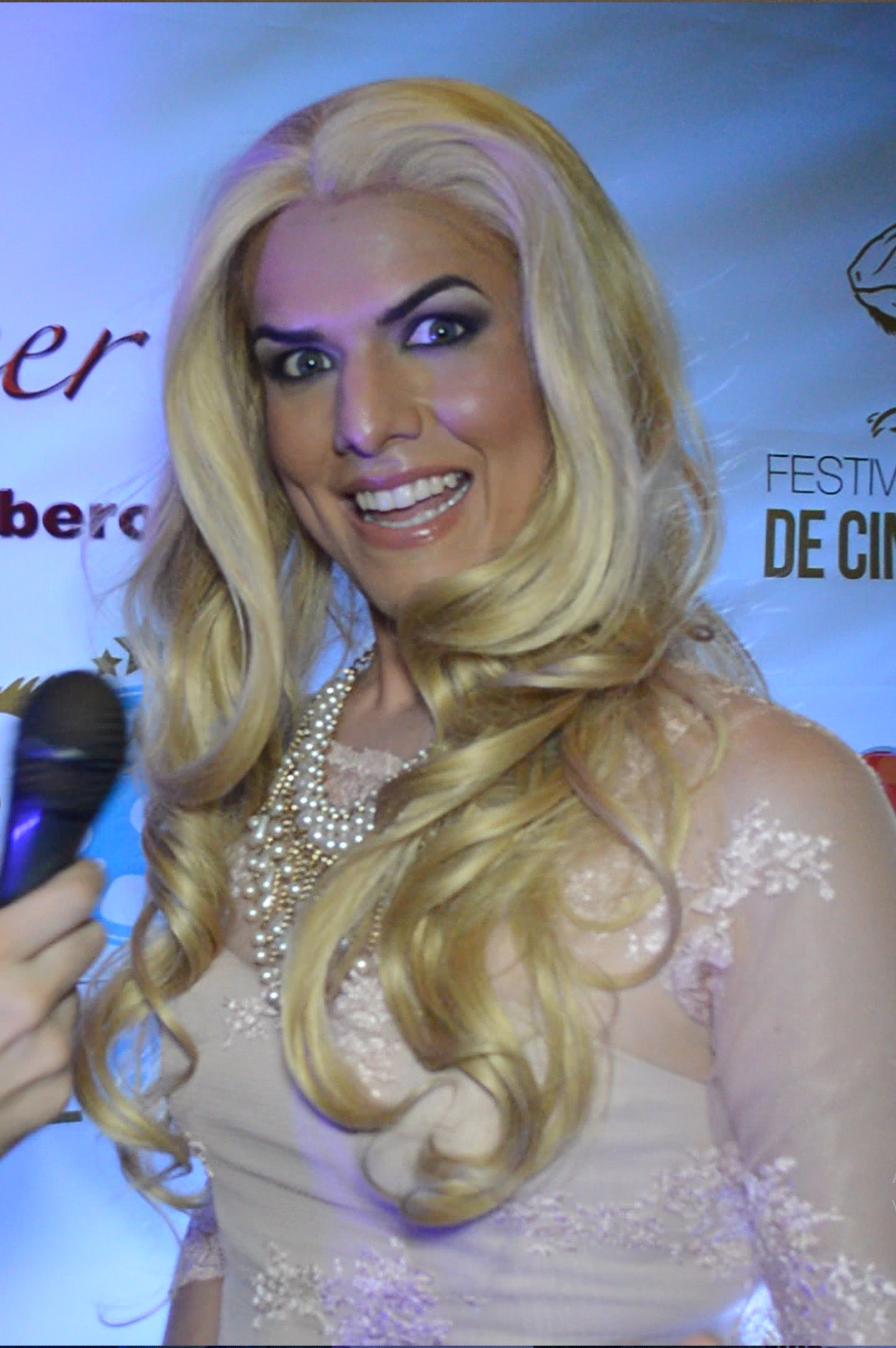 Kuki Entre Ríos, interpretado por Adrián Avilés, durante el primer Festival Internacional de Cine de Guayaquil en 2015.